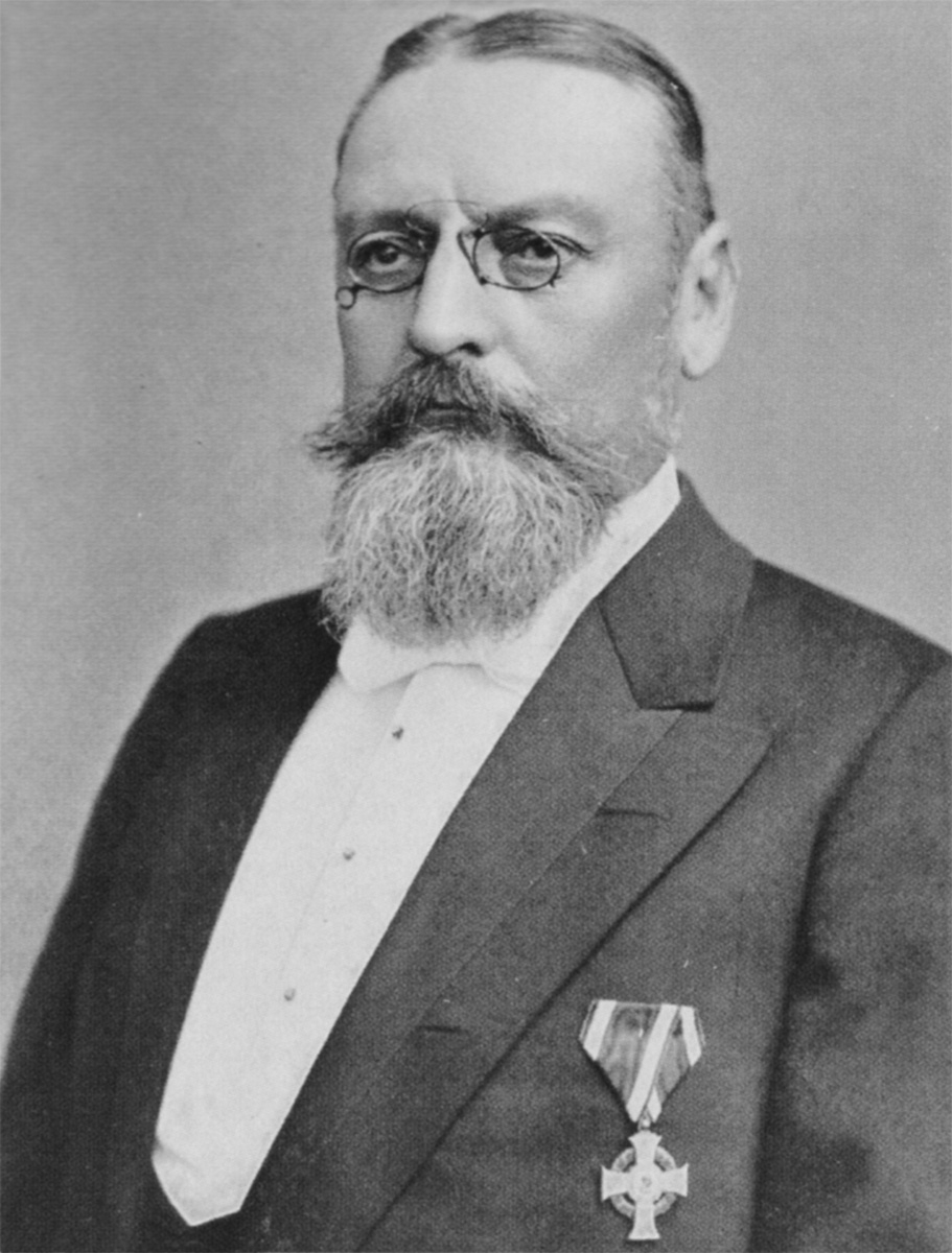 Georg Langbein, Firmengründer